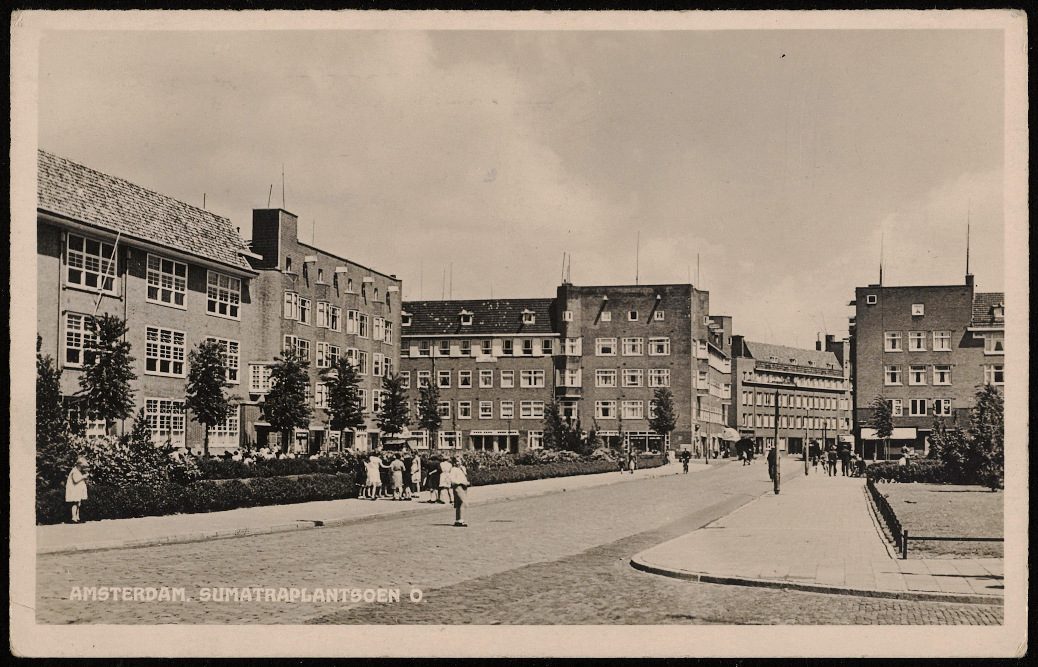 Beschrijving Sumatraplantsoen Documenttype prentbriefkaart Vervaardiger Onbekend Anoniem Collectie Collectie Stadsarchief Amsterdam: prentbriefkaarten Datering 1930 Geografische naam Sumatraplantsoen Inventarissen Afbeeldingsbestand PRKBB00383000002